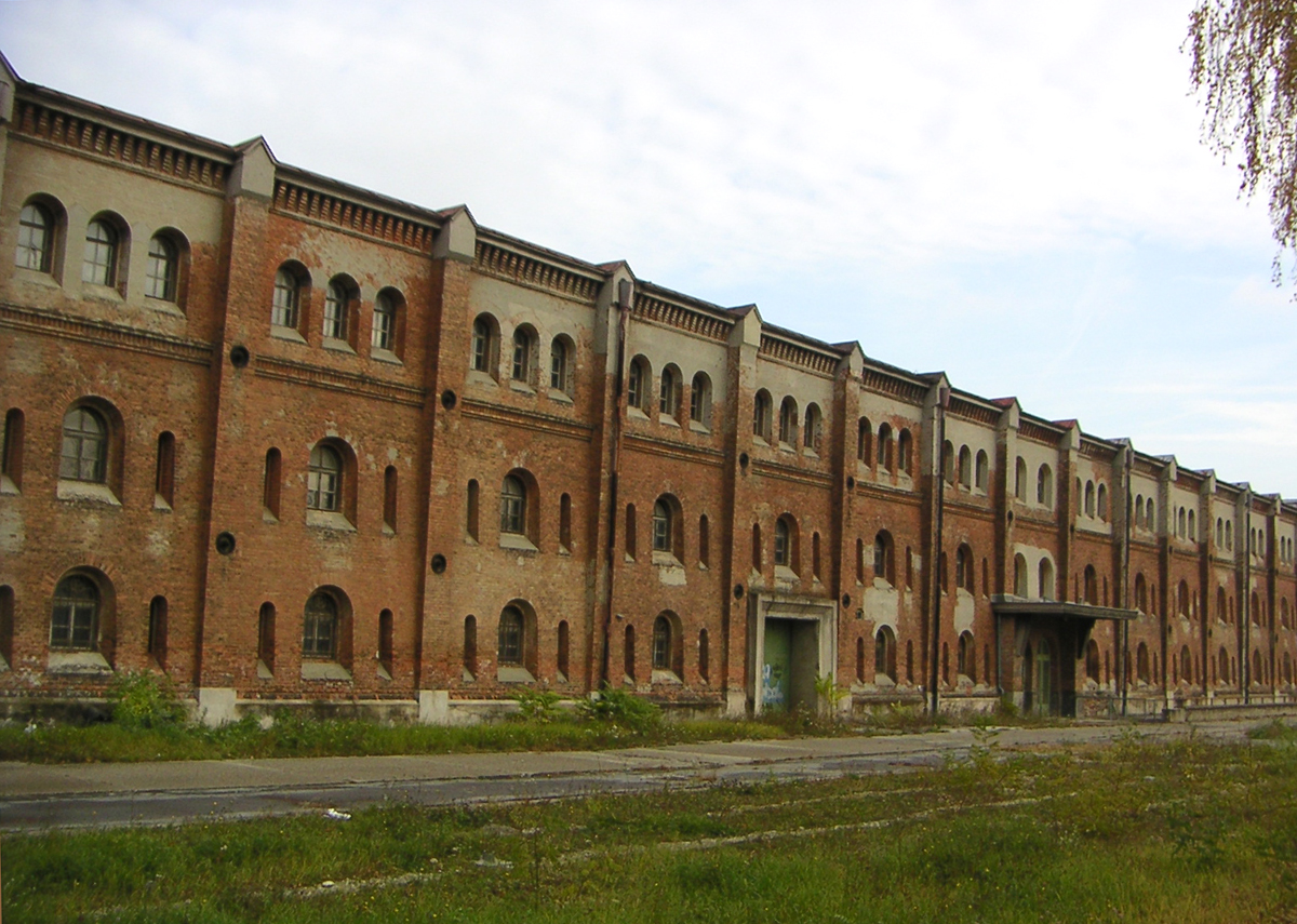 Beschreibung, Quelle und Lizenz Depots des Arsenals in Wien, selbst fotografiert, November 2005